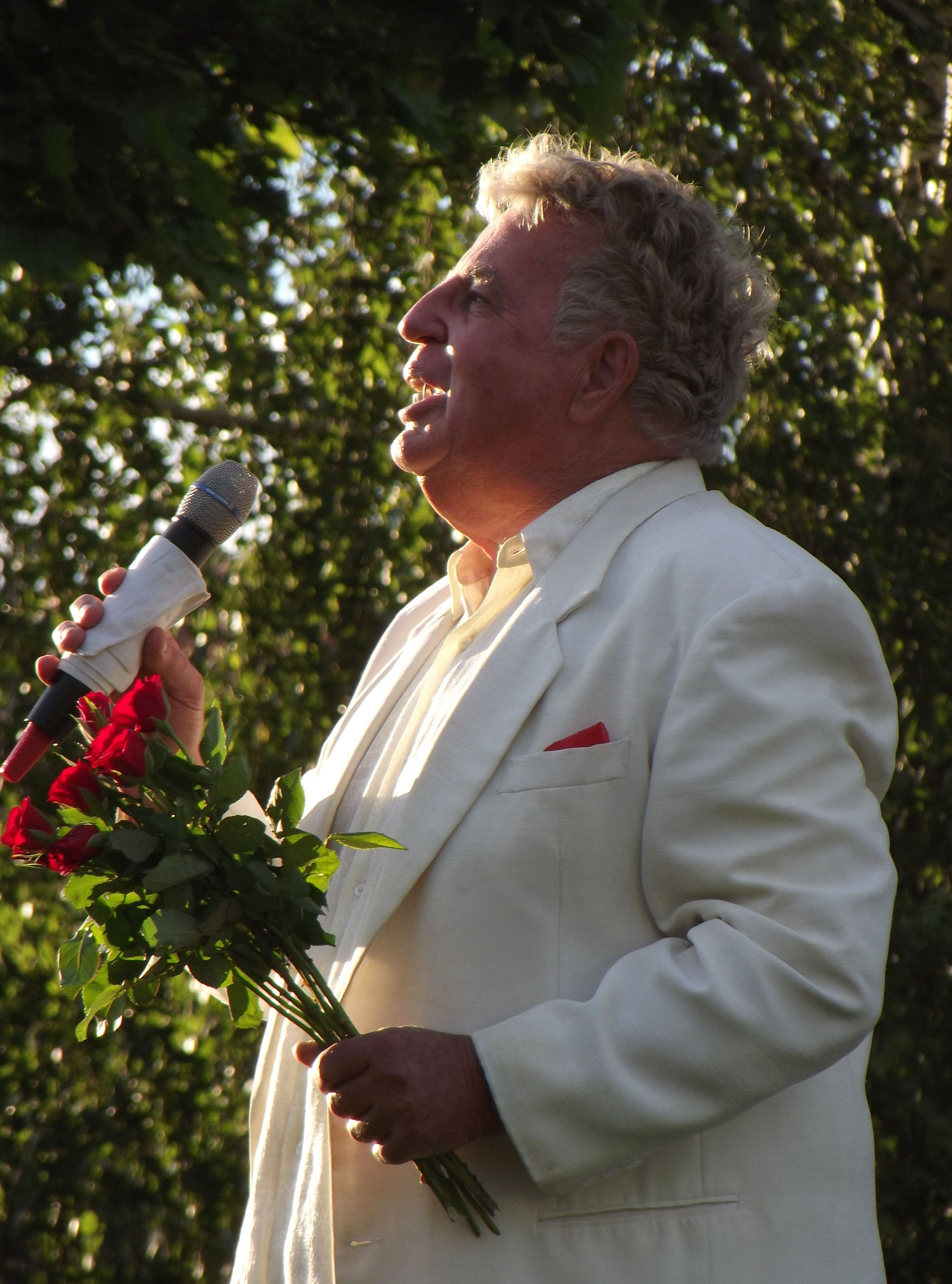 Erzähler der Nacht Nacht der Poesie